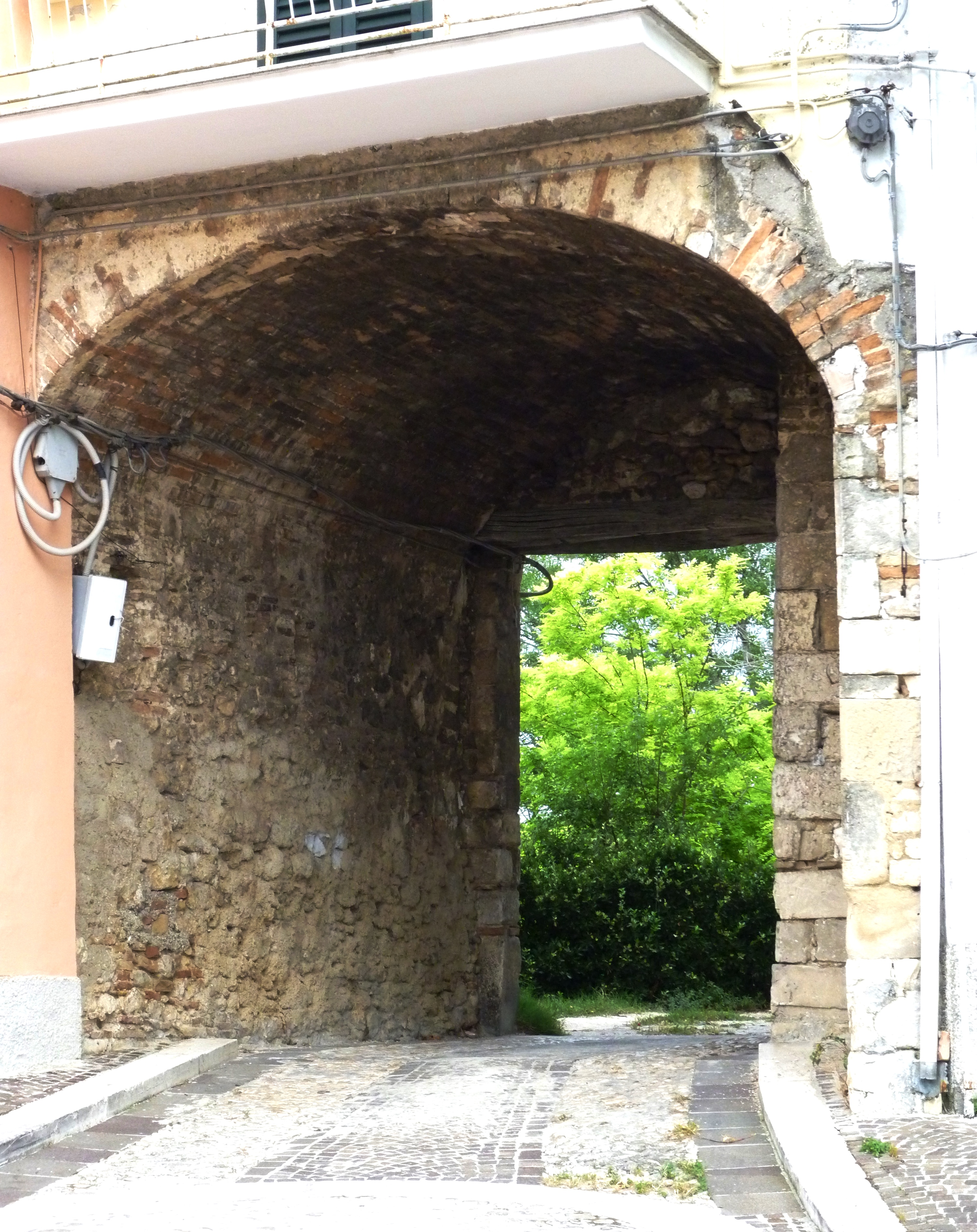 Porta del Vento, Guardiagrele, Chieti.